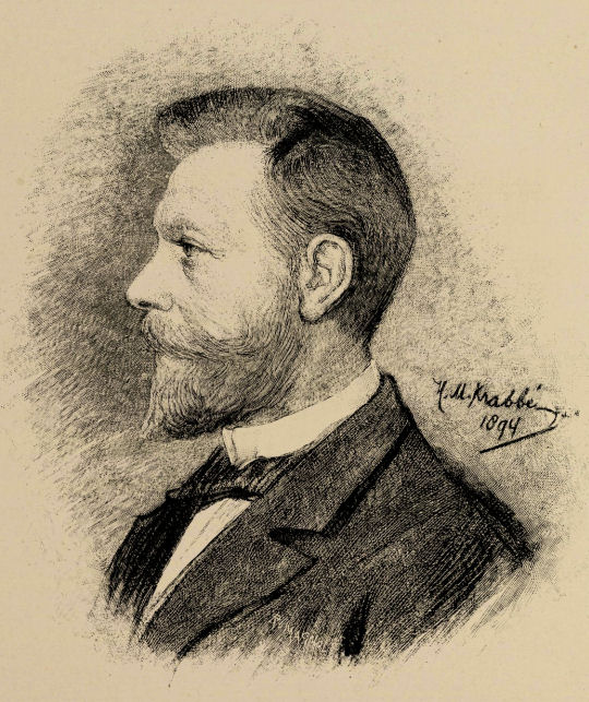 Portret van Jan Hillebrand Wijsmuller door H.M. Krabbé in 1894